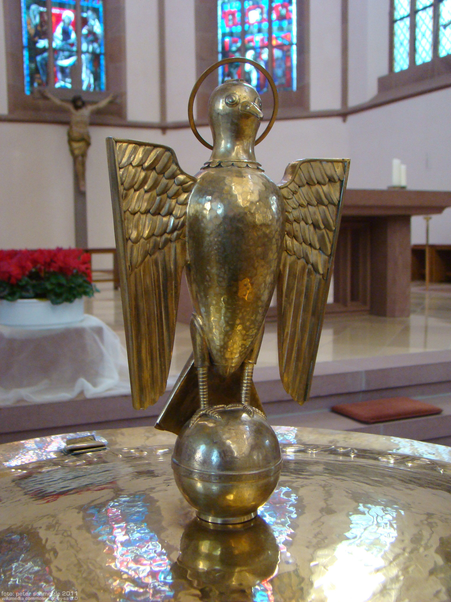 Taufbecken-Abdeckung der Pfarrkirche Unserer lieben Frau in Waibstadt